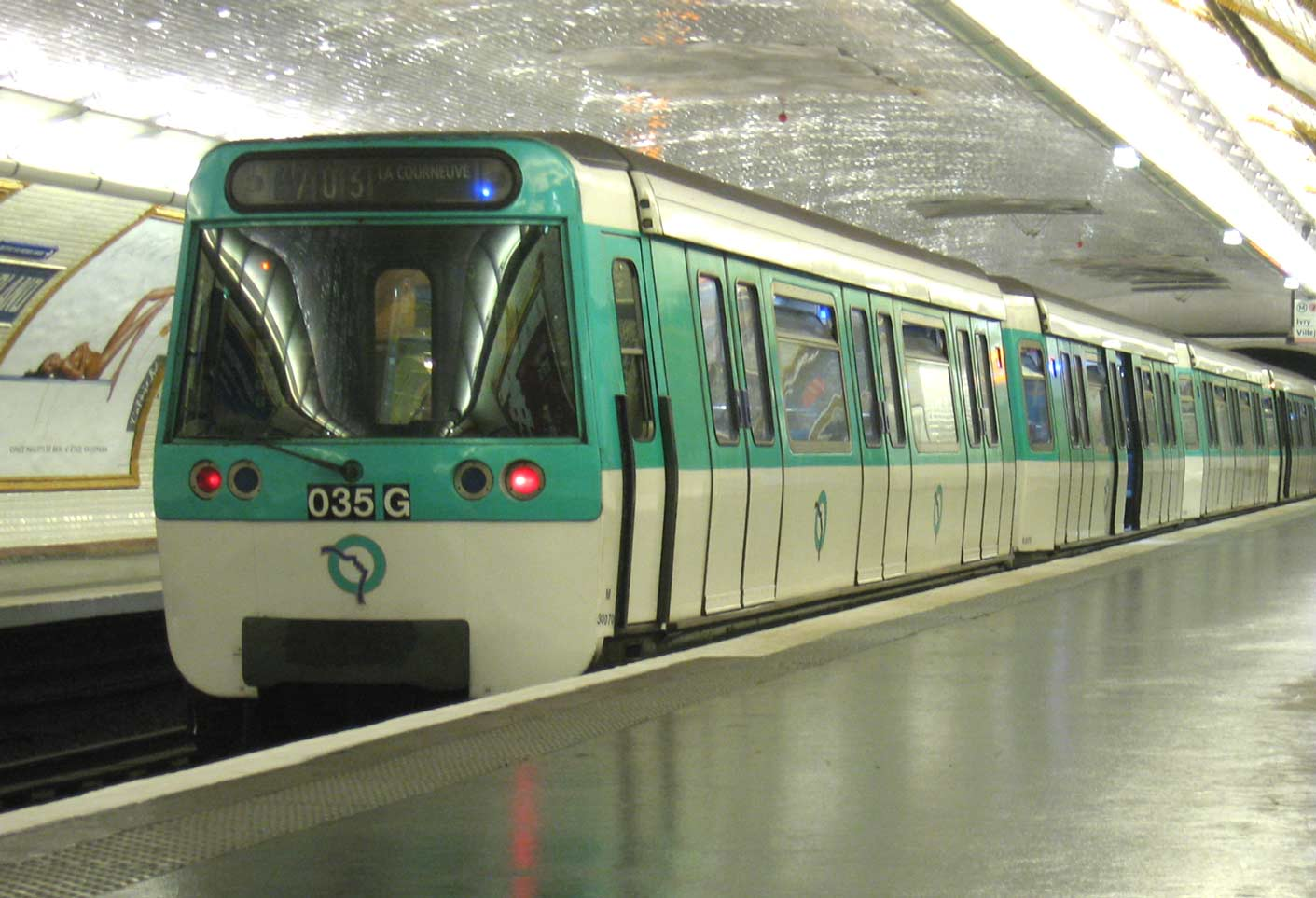 Metro de Paris Rame de la serie MF77 sur la ligne 7 a la station Sully – Morland.